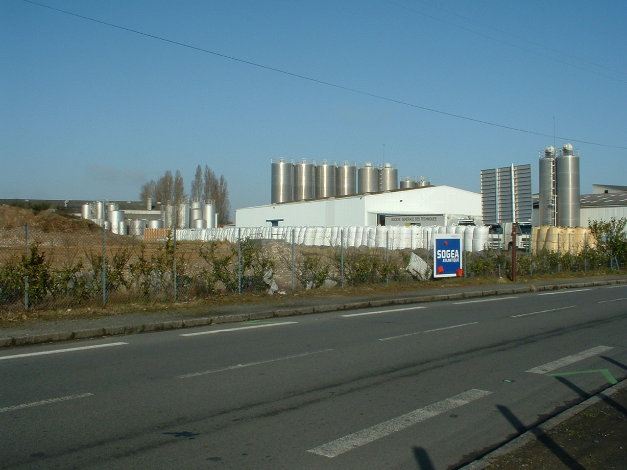 Aperçu de la zone d'activité les îles-Atout sud